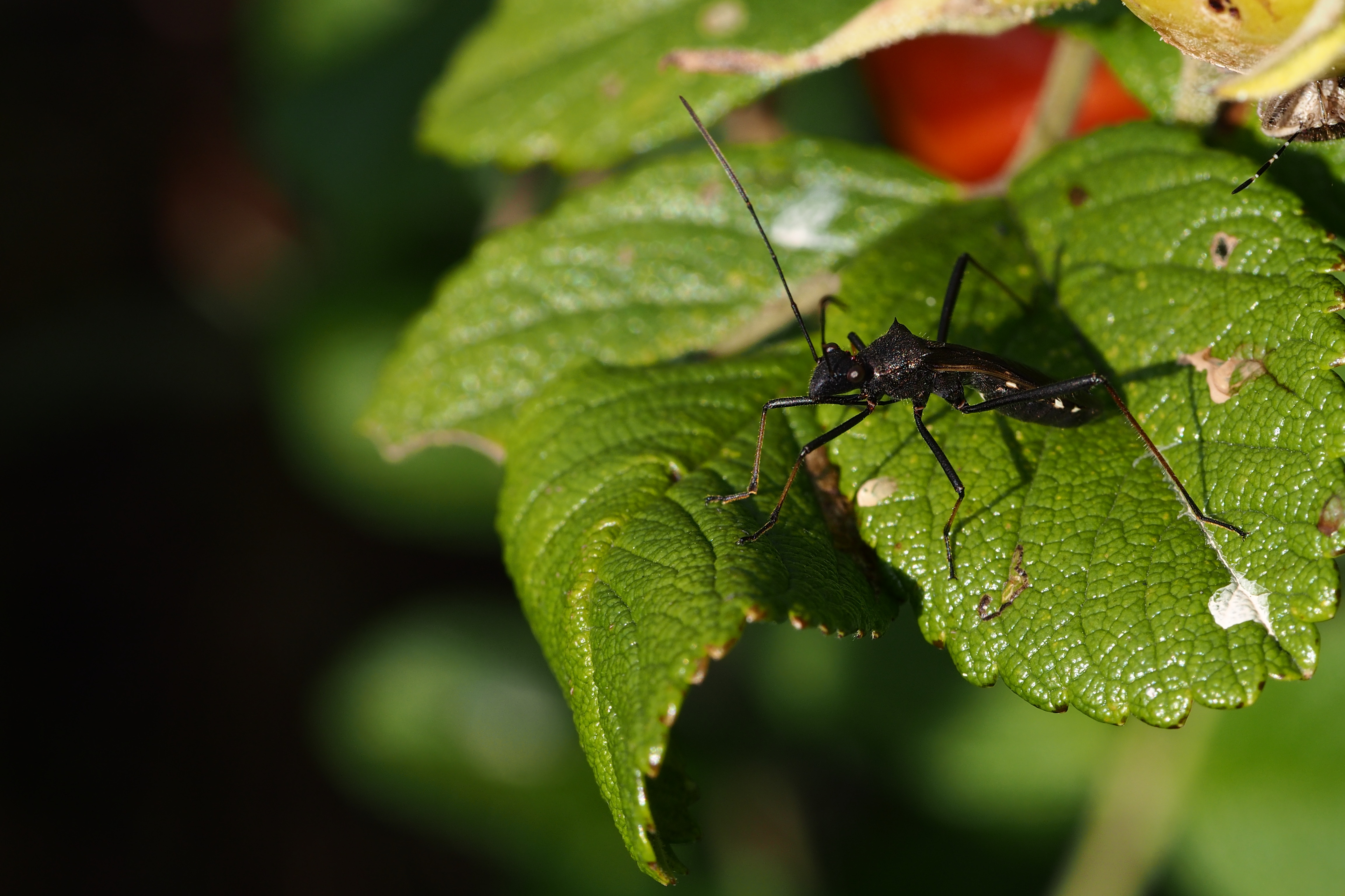 豊平川